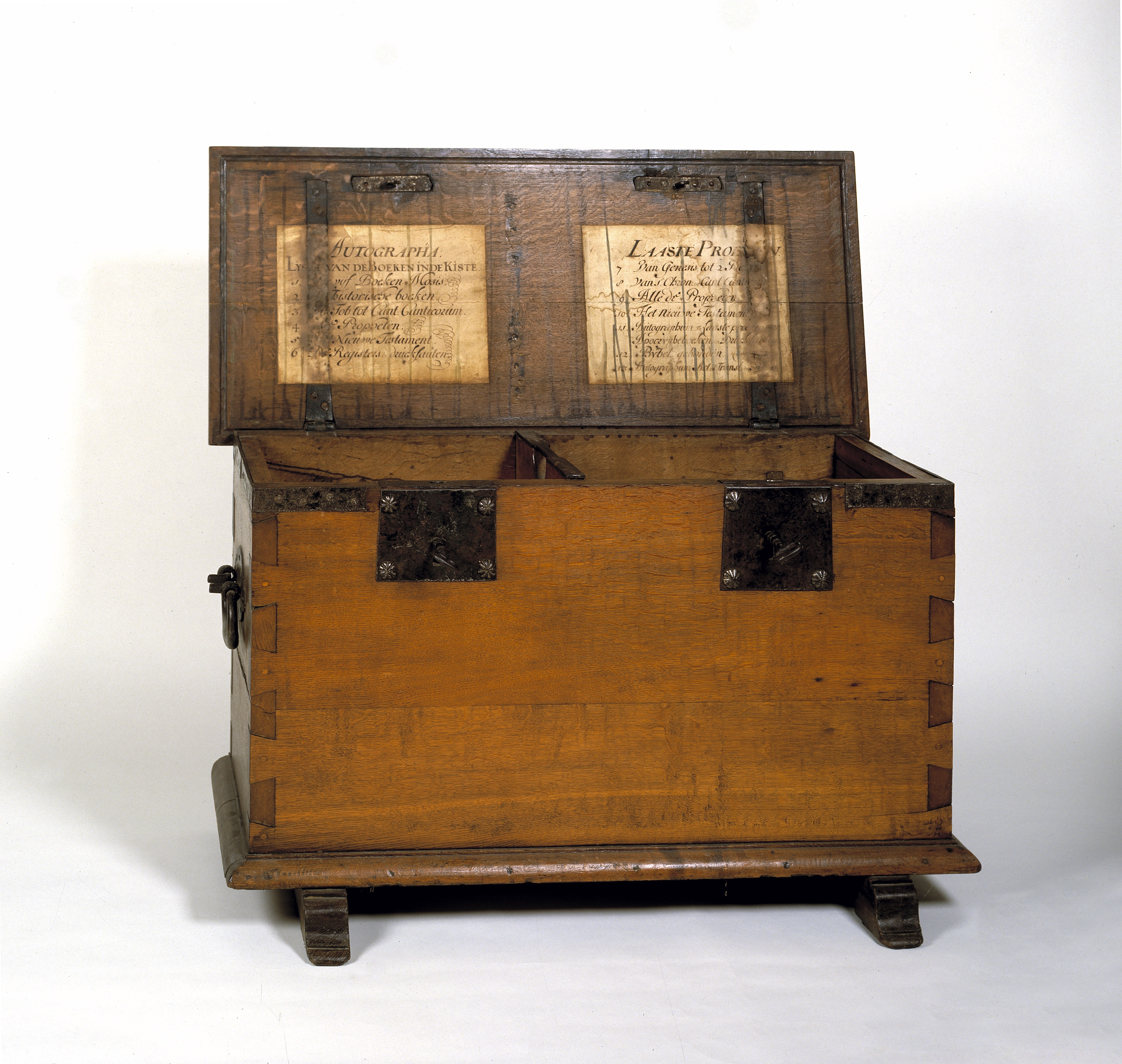 Kist voor de originele stukken van de Statenvertaling\n1662\nSPKK v39\n\nHebben protestanten ook relieken? In ieder geval bewaren ze eeuwenlang in deze kist zeer zorgvuldig de vertalingen ter voorbereiding van de Statenvertaling van 1637. Iedere drie jaar zijn ze gecontroleerd door afgevaardigden van de Staten-Generaal en van de Kerk. Dit gebeurt volgens een plechtig ceremonieel, voorafgegaan door gebed en besloten met dankzegging. Zo belangrijk achten de protestanten de oorspronkelijke stukken, waaraan de vertalers jarenlang hebben gewerkt. De oorspronkelijk archiefstukken zijn nu te vinden in Het Utrechts Archief